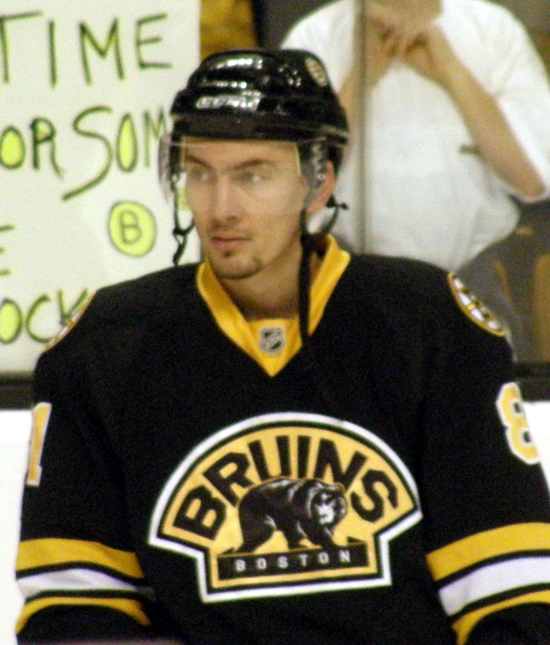 81, Miroslav Satan, LW, BOSPittsburgh Penguins at (vs) Boston Bruins, TD Banknorth Garden (Boston Garden), March 18, 2010